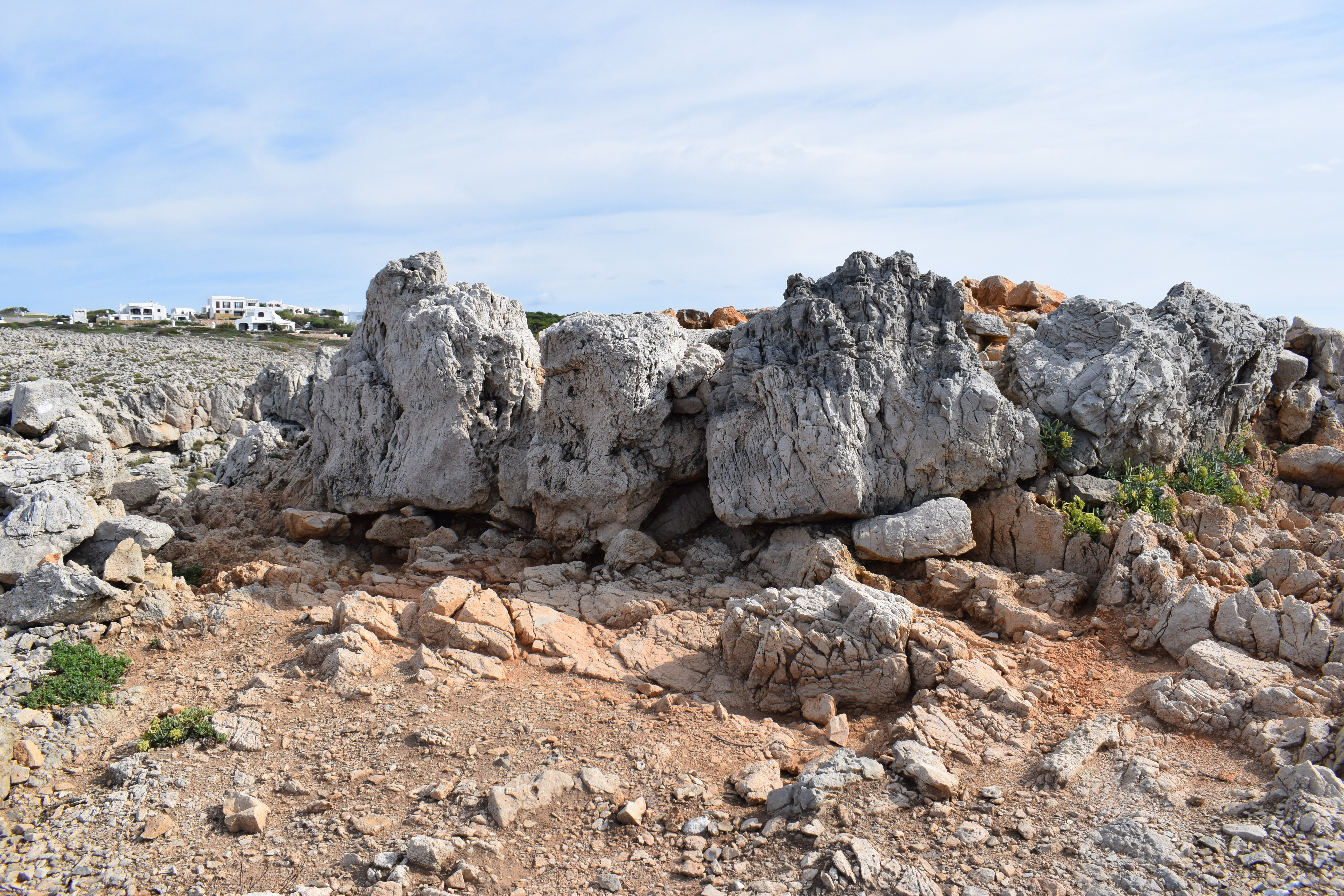 Reste eines Gebäudes auf dem höchsten Punkt der Küstensiedlung von Cala Morell, Menorca.